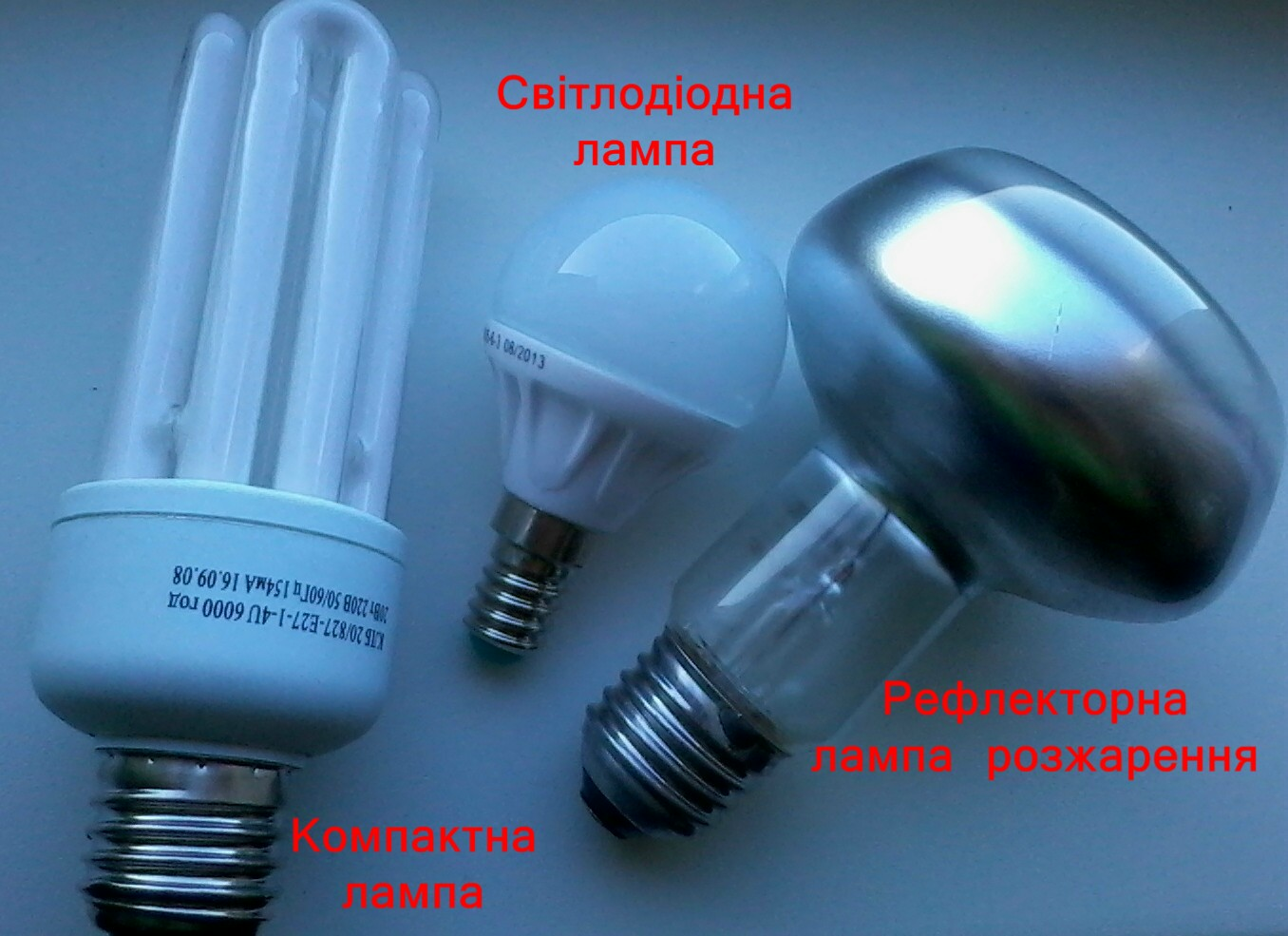 Знято мобілкою Самсунг